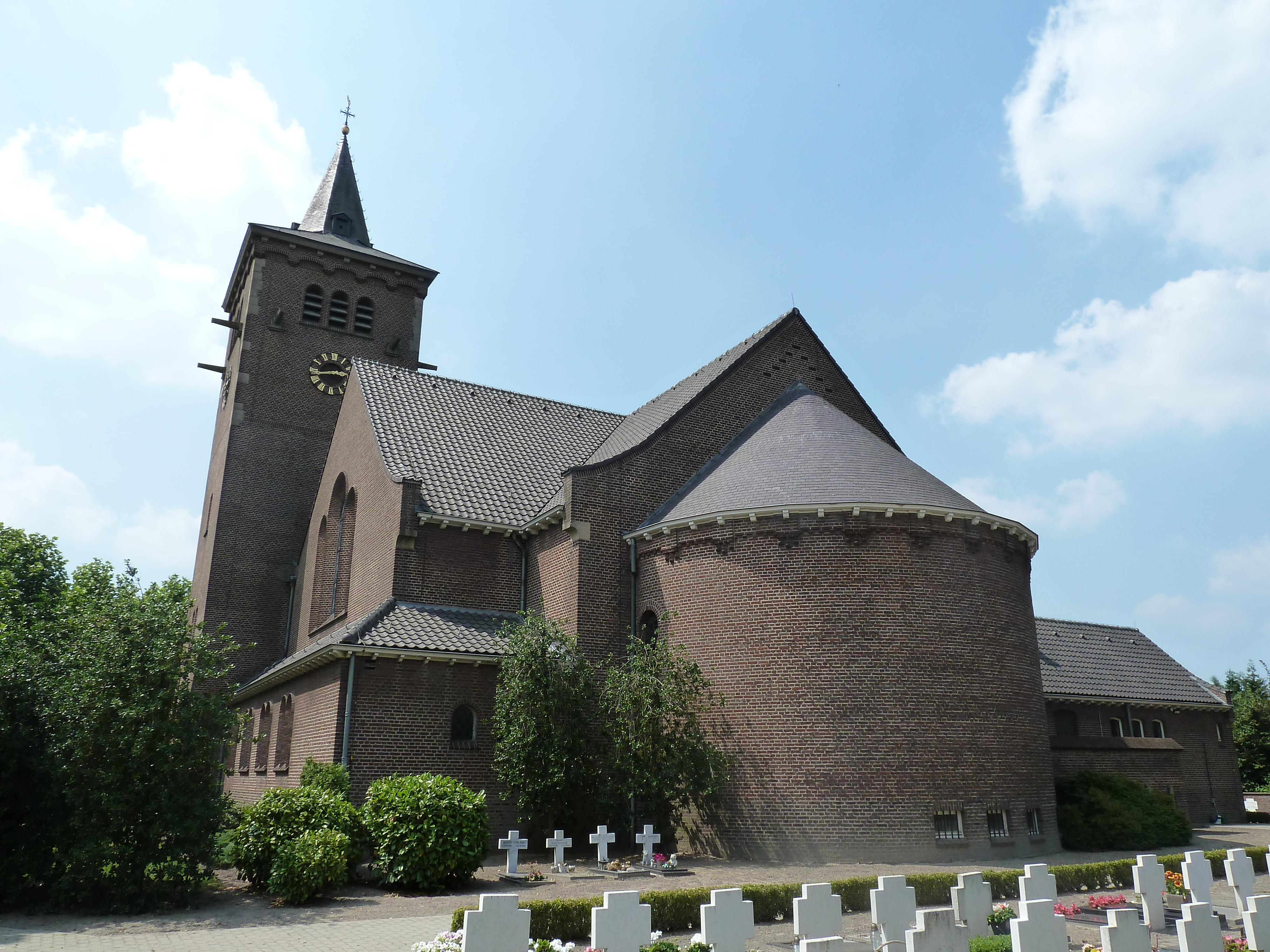 Sint-Barbarakerk, Leveroy, Nederland